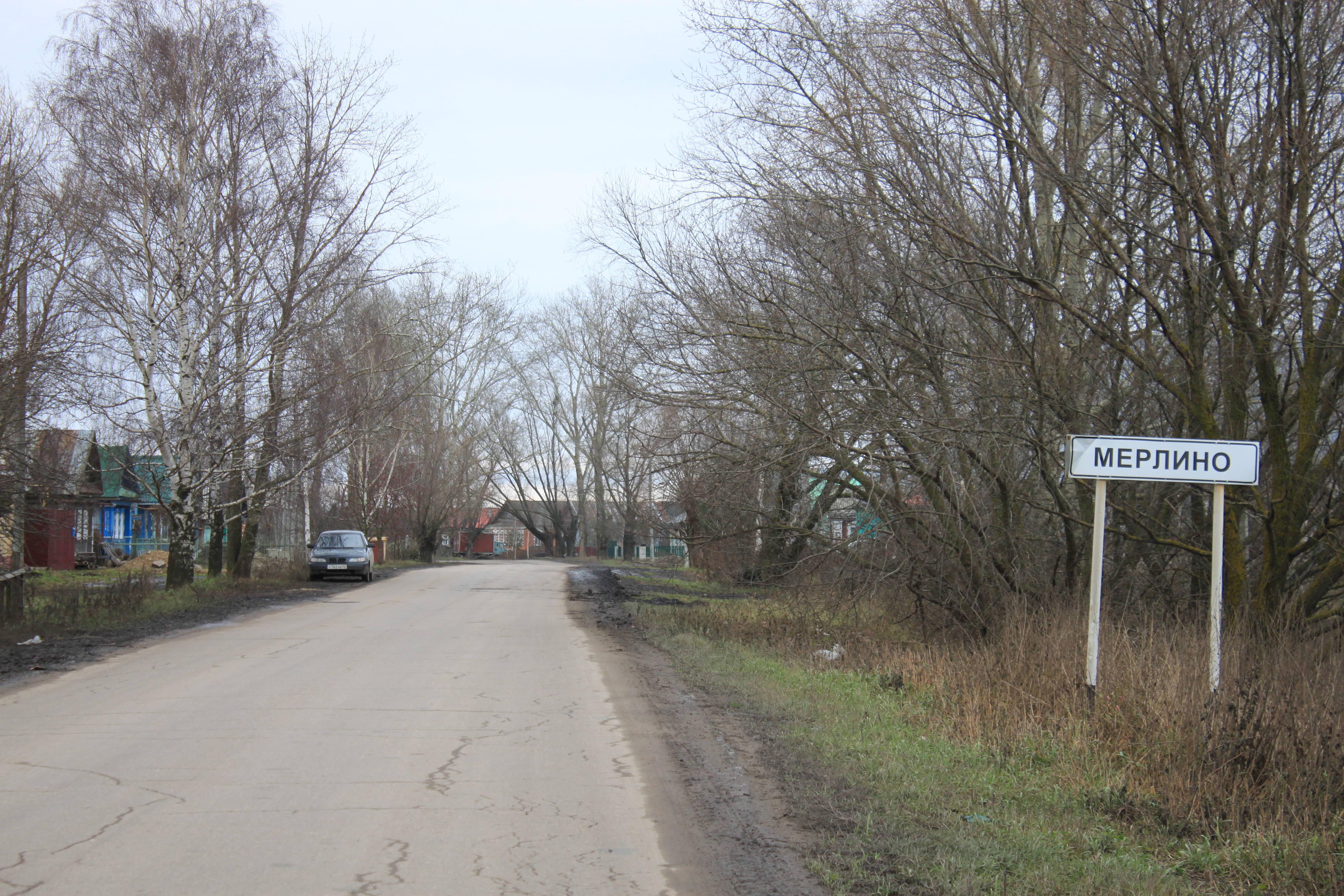 Мерлино Арзамасский район